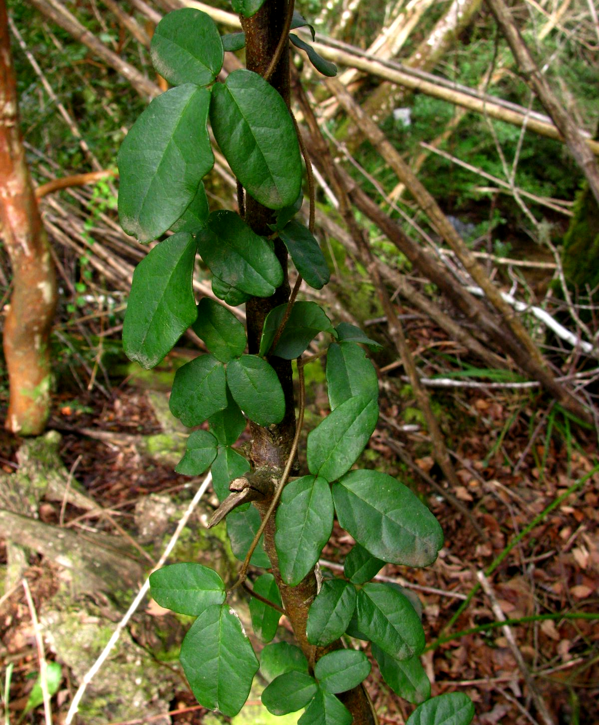 Family: Lardizabalaceae